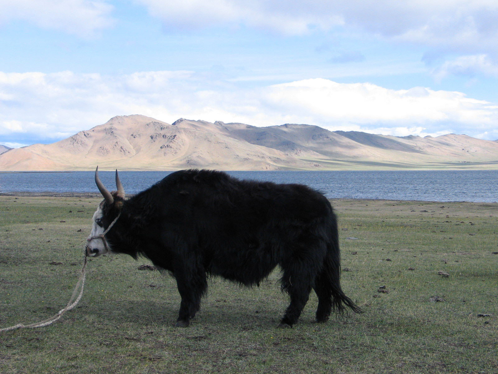 Yak (Bos grunniens) in der Mongolei.